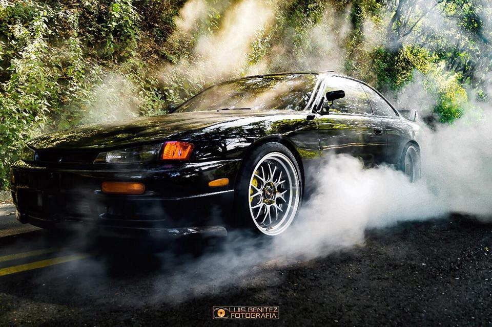 240sx s14 kouki